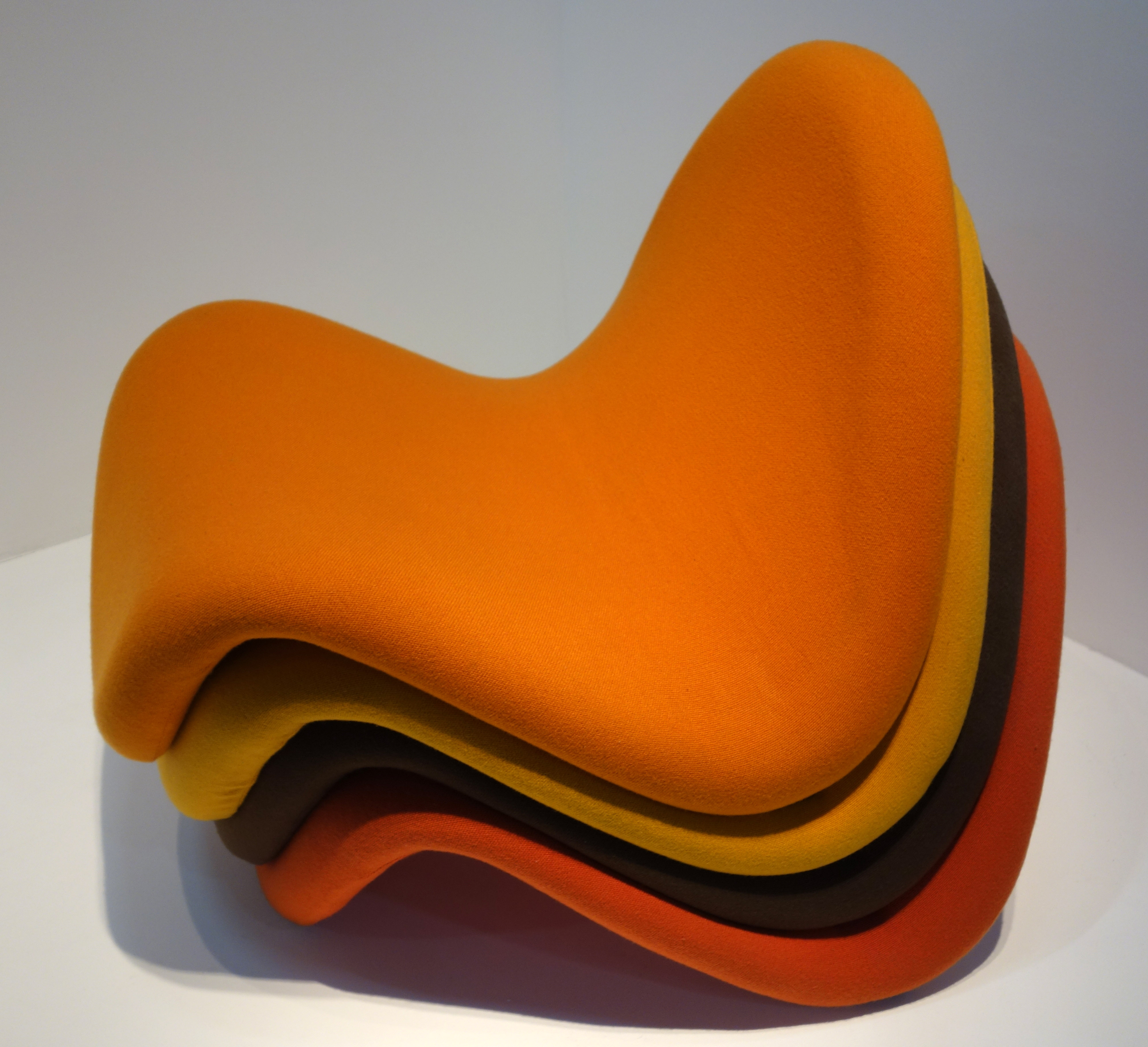 Sièges 577 dit "Langue" (1997) de Pierre Paulin. Musée national d'art moderne, Paris, no. AM 1992-1-831 à 833..